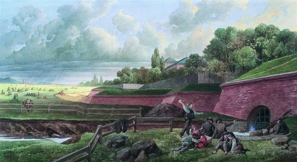 Der Linienwall mit den Feldern an der Stelle des Währingergürtels.